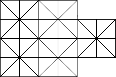 虎棋棋盤的一種。